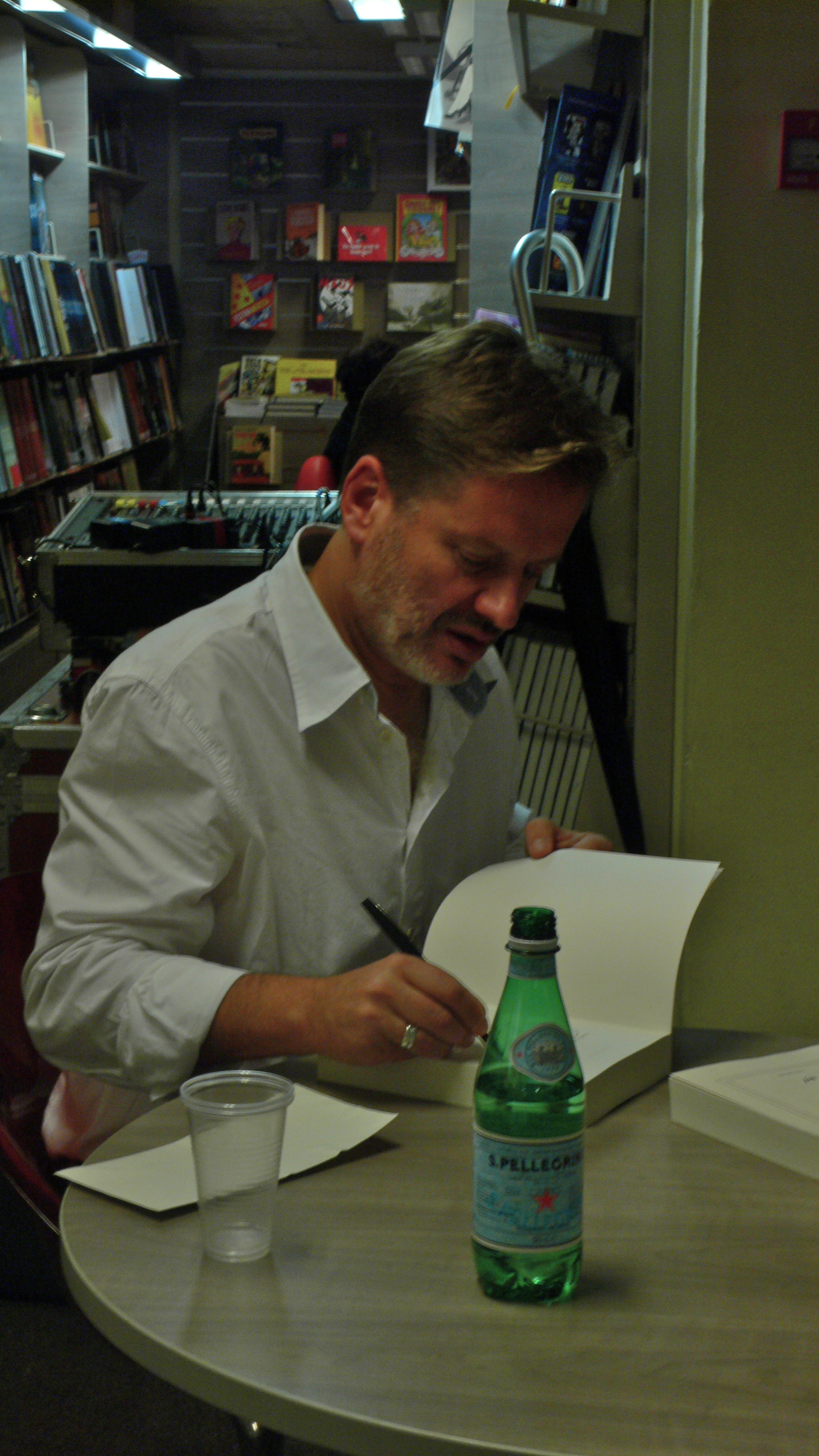 L'écrivain Alexis Jenni le 4 novembre 2011 à la librairie Decitre à Lyon lors d'une dédicace de son livre L'Art français de la guerre pour lequel il a reçu le prix Goncourt.